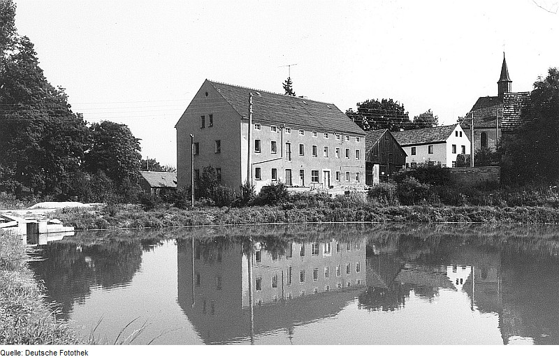 Original image description from the Deutsche Fotothek Weißenberg-Kotitz. Ehem. Kotitzer Mühle